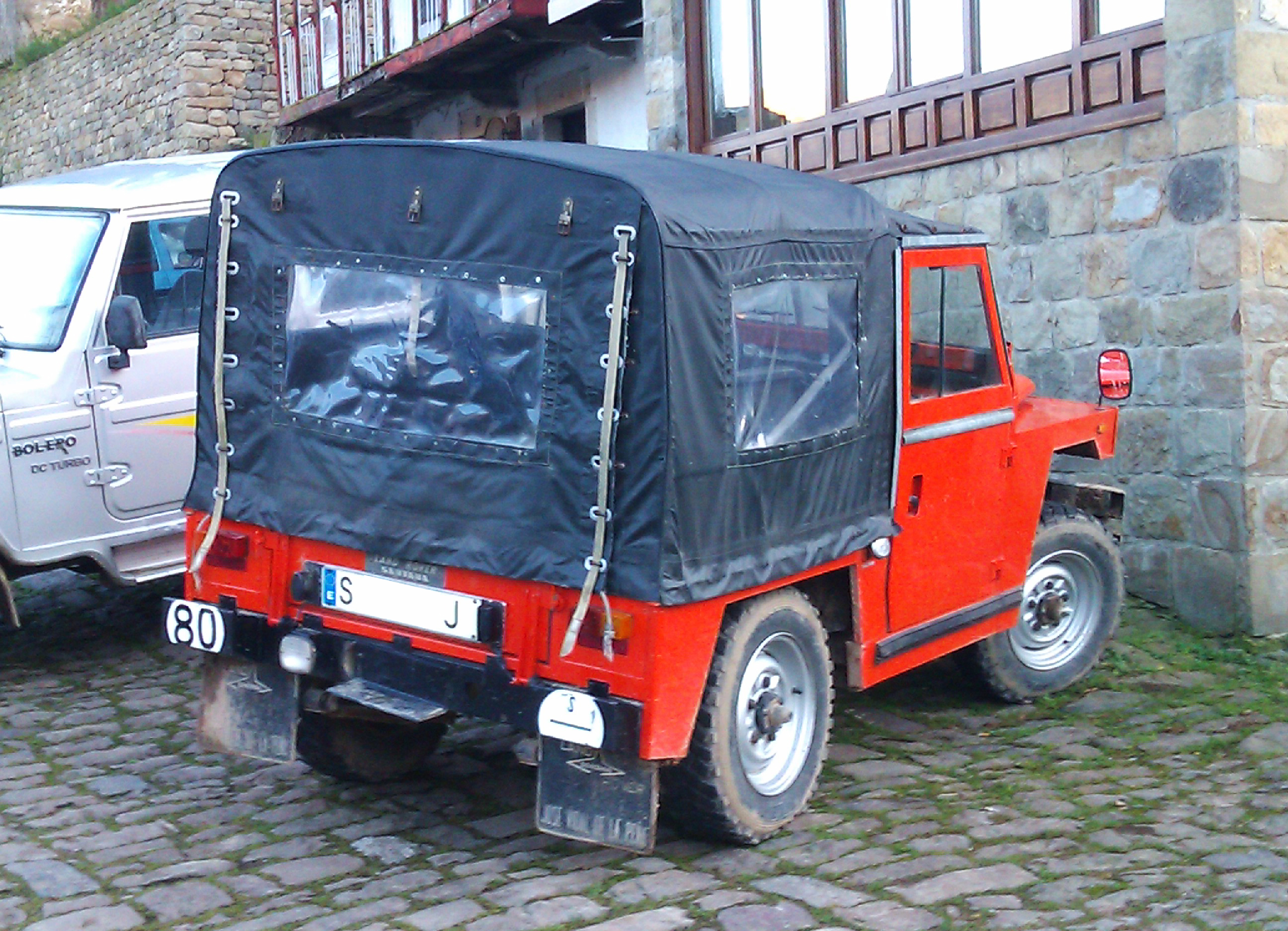 1981 Land Rover Santana 88 Ligero